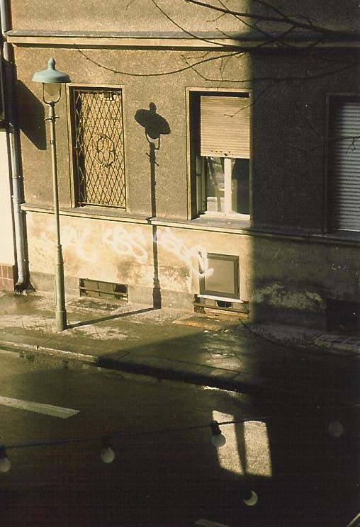 Fotografie, Laternenschatten, Heesestraße, Berlin-Steglitz, Verena Pfisterer, 1993